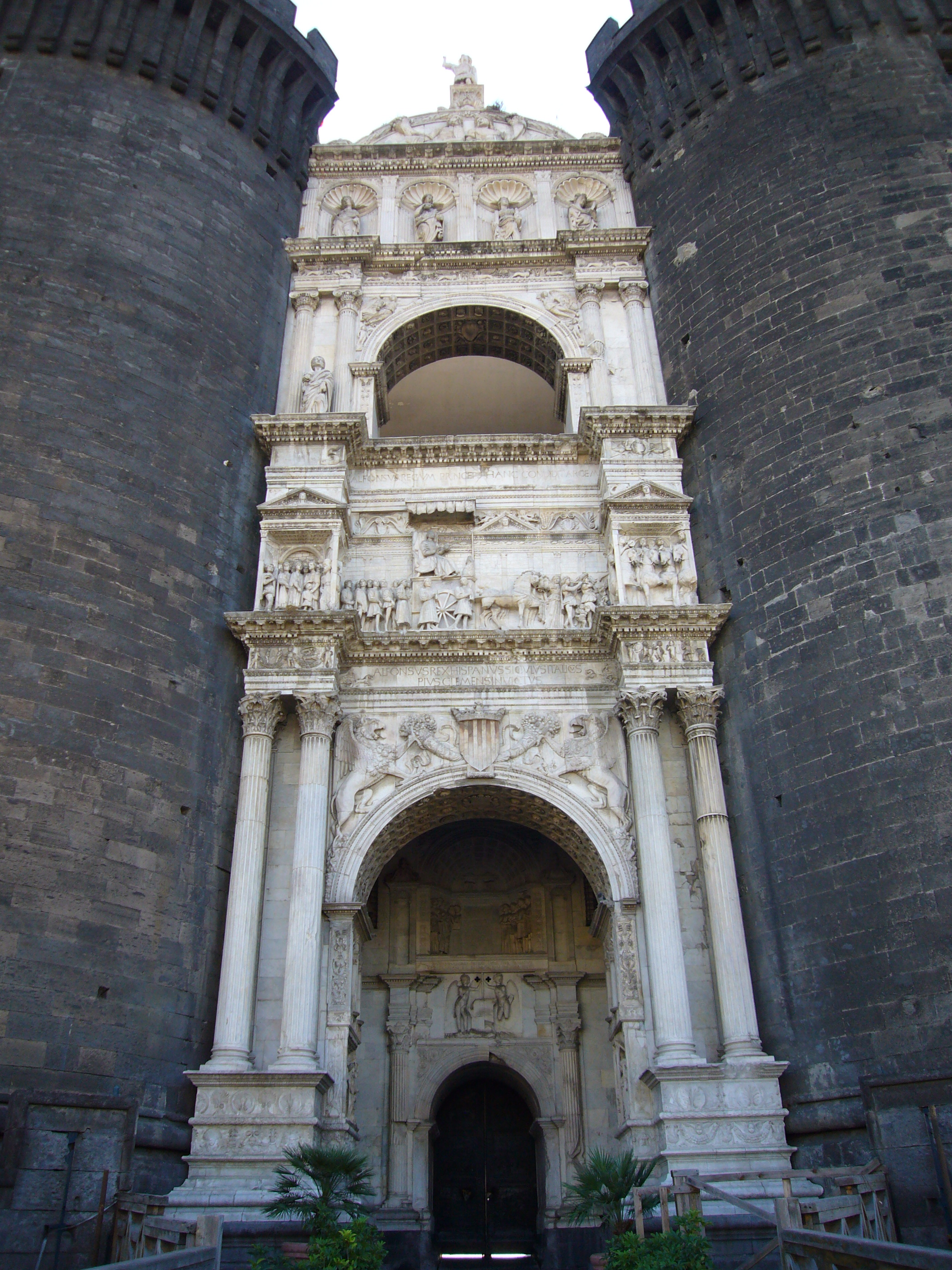 Napoli, Castel Nuovo:Arco trionfale di Alfonso d'Aragona